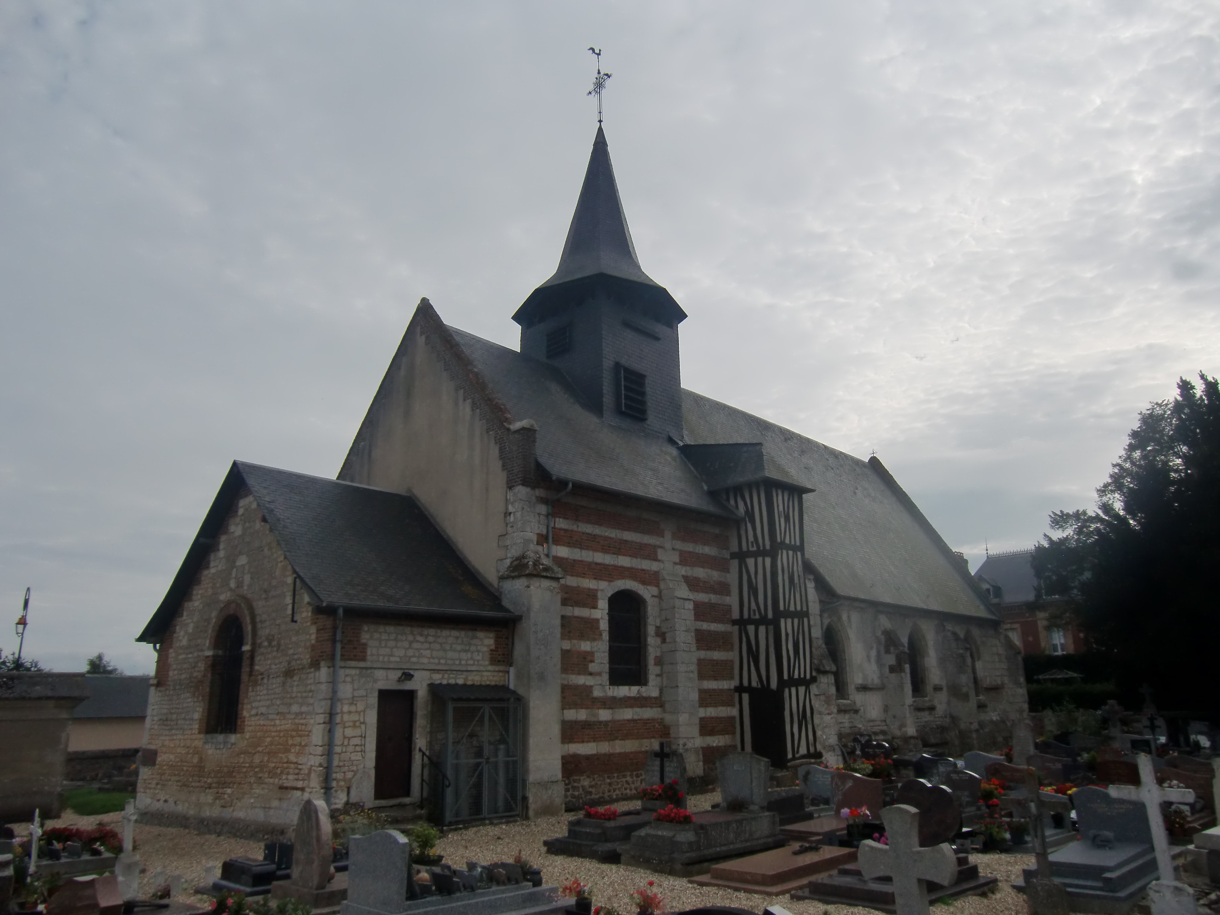 Église de Berville-en-Roumois (Eure, Normandie, France)